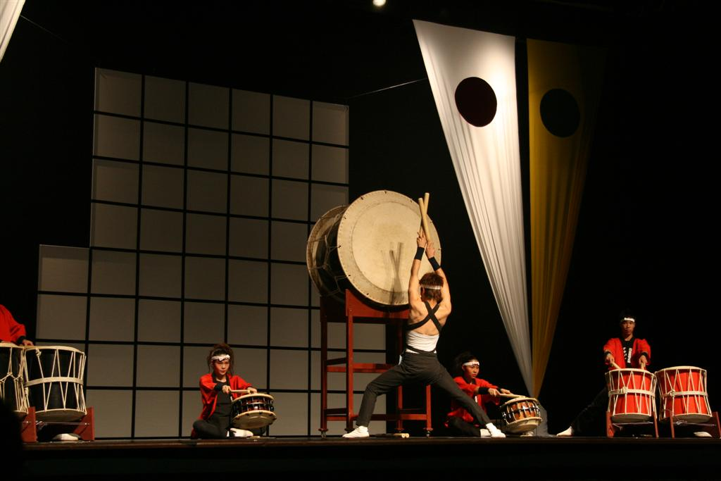 Apresentações de Taiko, dia 08/08/2008, na Sala Acrísio de Camargo (CIAEI), em Indaiatuba/SP. Grupos convidados de Jundiaí e Atibaia. Foto: Luma Kimura